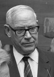 Empfang der La. Vertr. Niedersachsen anl. Geburtstag von Frau Min. Maria Meyer-Sevenich (v.l.n.r.: Bundesgesundheitsminister Frau Strobel; Ministerpräsident Dr. Zinn; Staatssekretär Dr. Fritz Schäfer, Bundesministerium für Angelegenheiten des Bundesrates und der Länder)